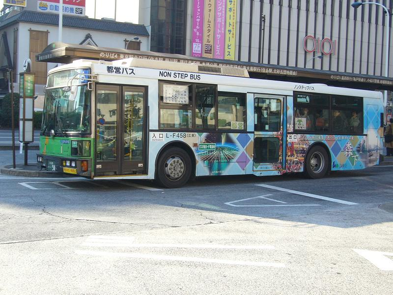 登録番号：足立200か・・94 都営バス(Toei bus)江東営業所所属 car.no L-F458 日産ディーゼル・スペースランナー KC-UA460KAM 錦糸町駅南口 (Kinshicho station South gate) にて撮影